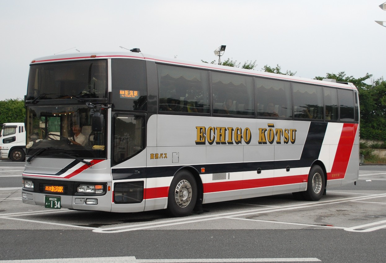 越後交通新潟230あ134。高速バス「東京-新潟線」。関越自動車道上里サービスエリアにて撮影。